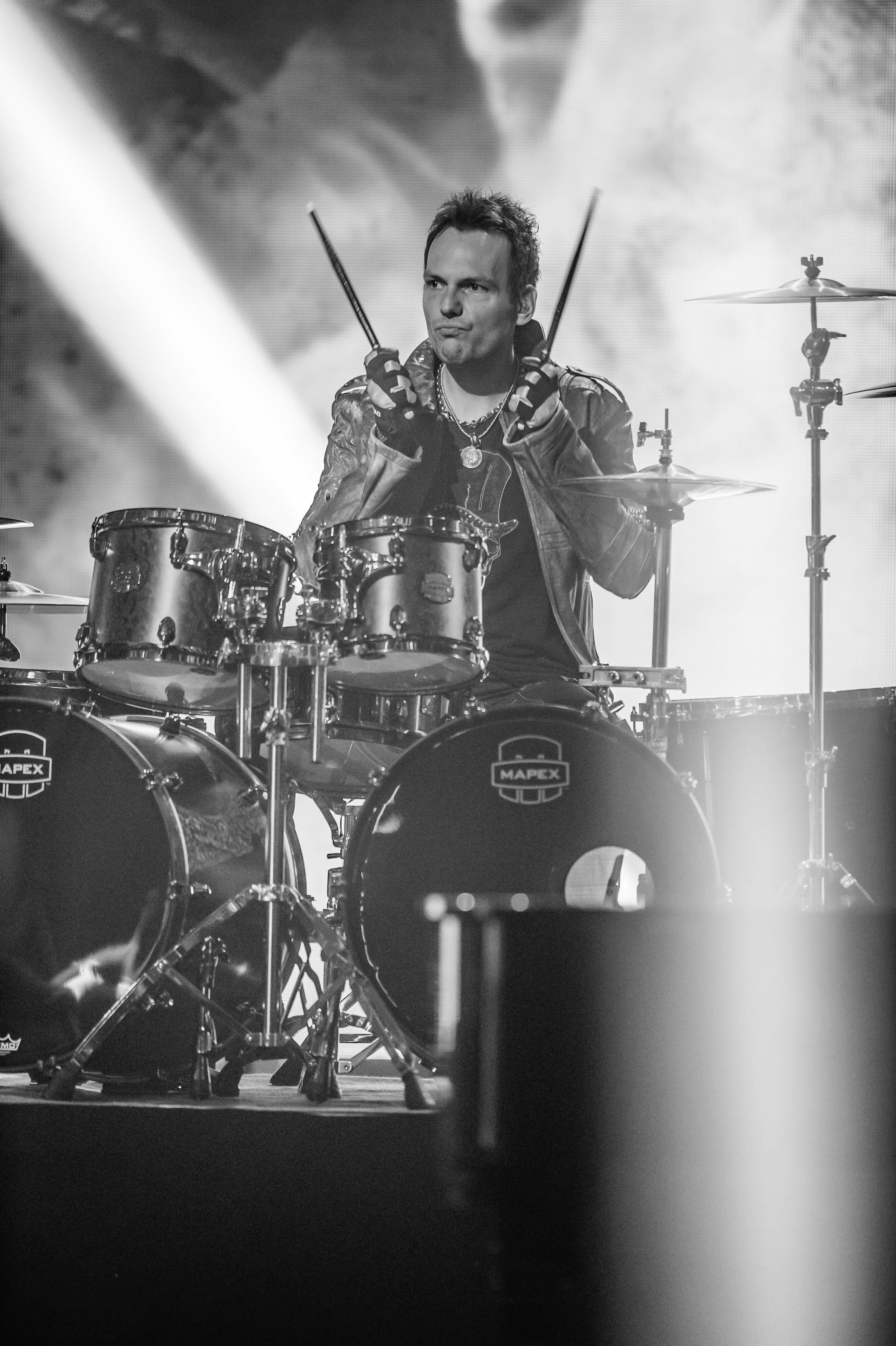 Eurovision Song Contest 2016 - Unser Lied für Stockholm - Avantasia